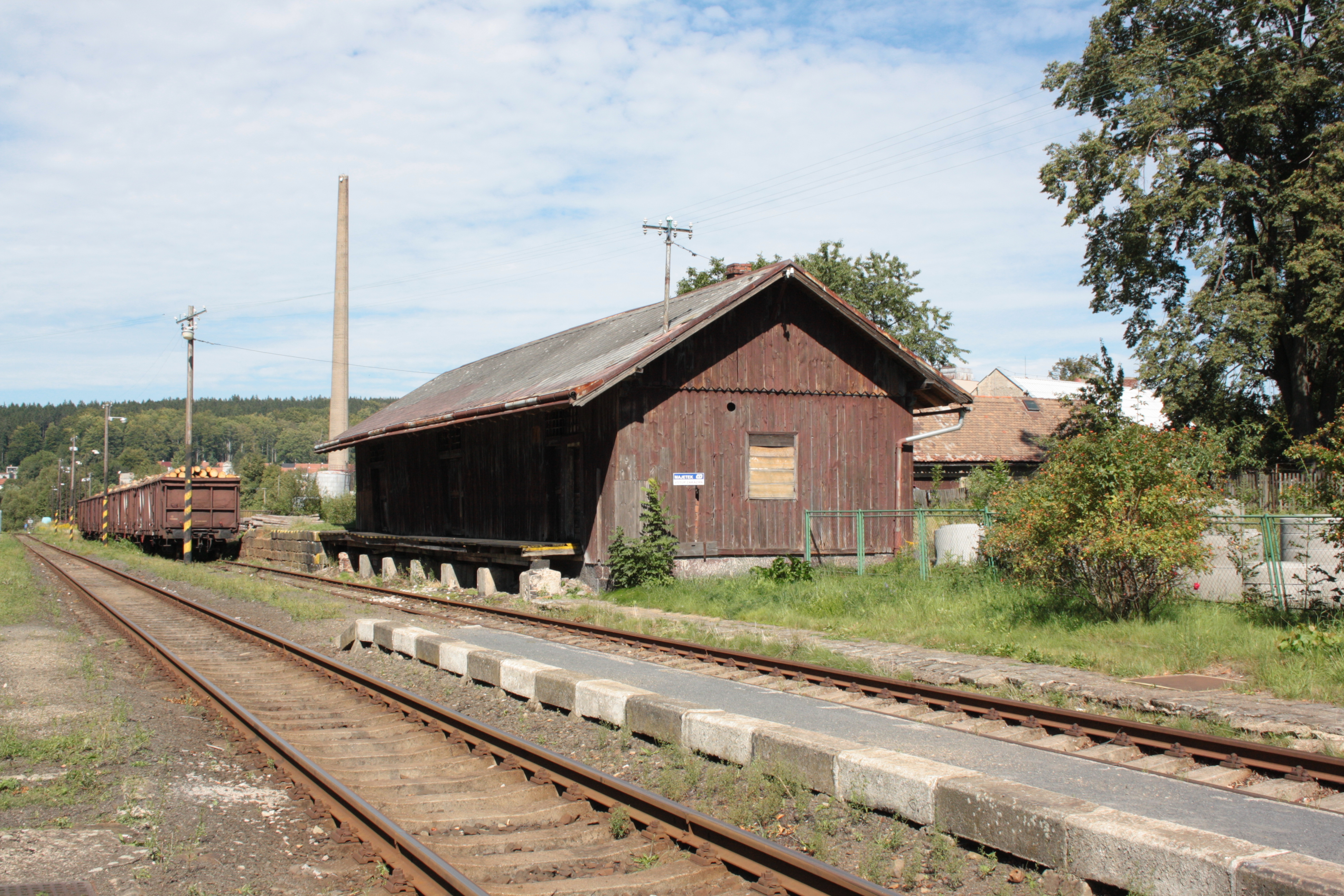 Skladiště v železniční zastávce v Novém Městě pod Smrkem (pohled od jihozápadu).